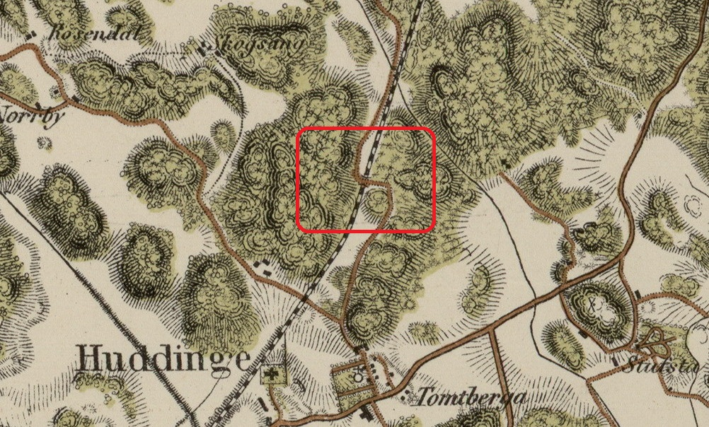 Del av "Trakten omkring Stockholm 1861 (blad 6)" med Huddinge kyrka, Döda bron.